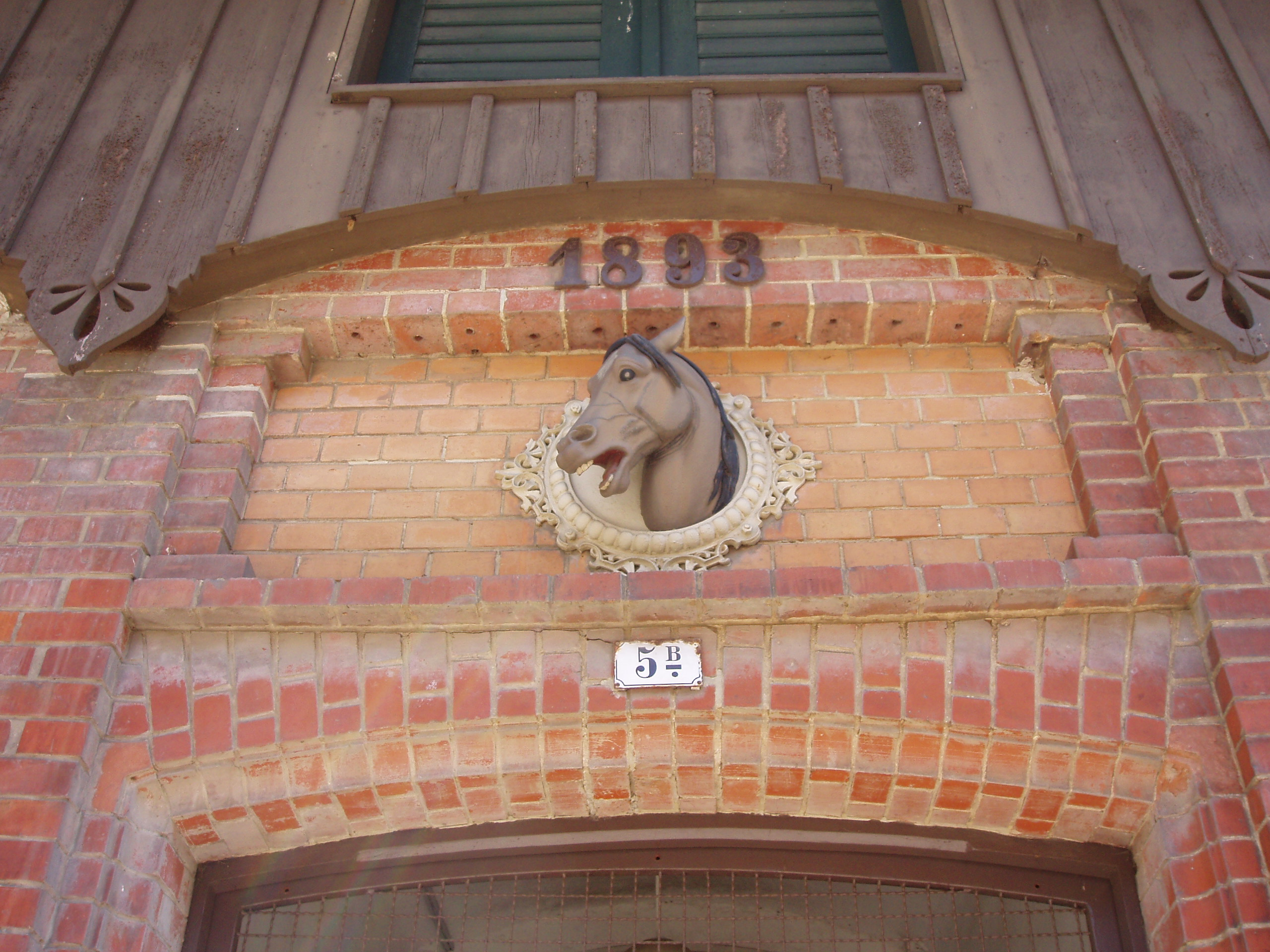 Gebäudeschmuck am Gestüt in St. Johann